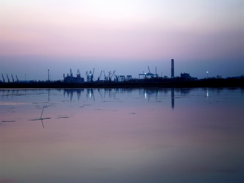 veduta di Monfalcone dal Lisert; foto di nuvoledicarta2003, scattata il 14 febbraio 2009